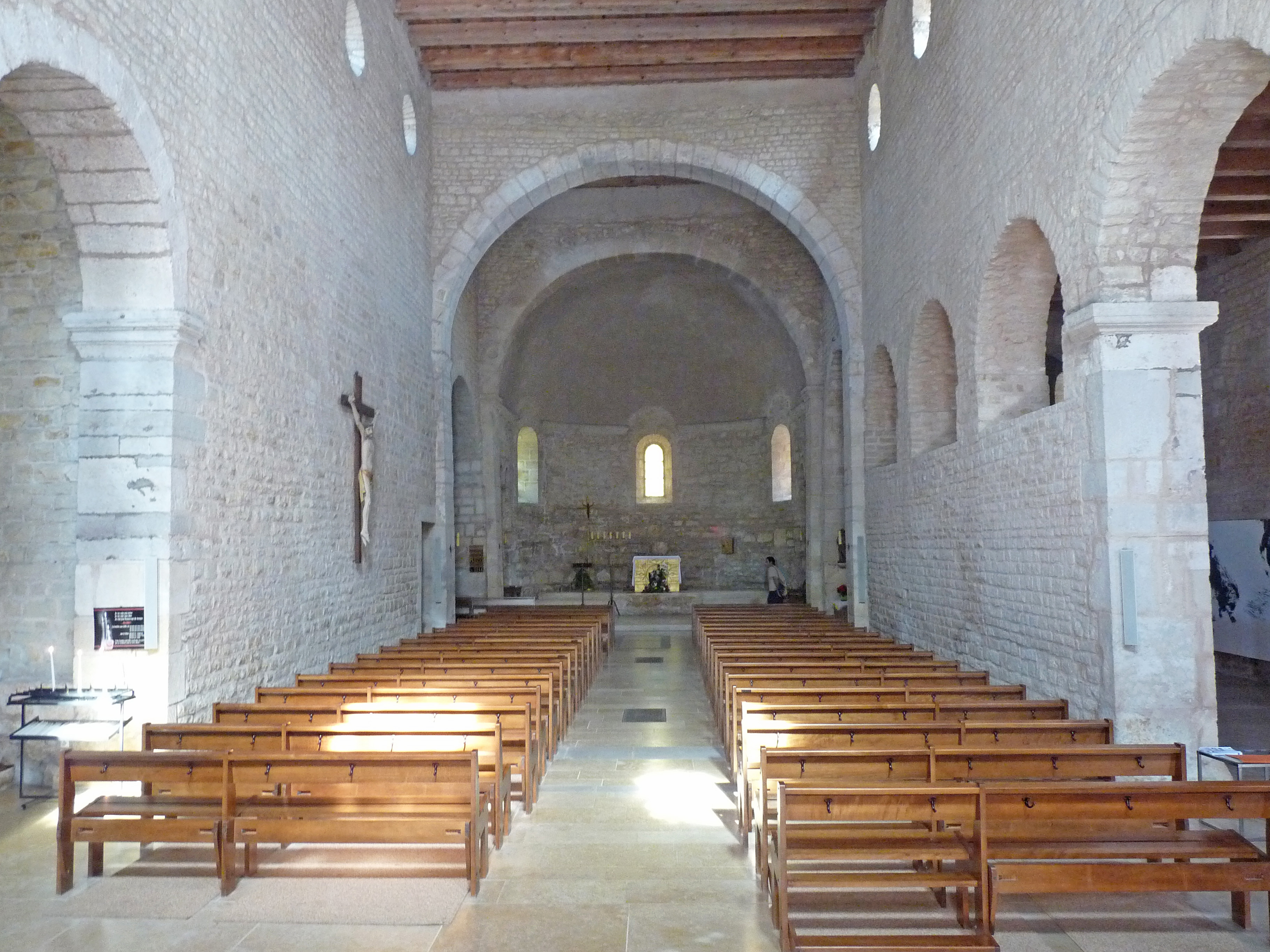 Feldbach (Haut-Rhin) : intérieur de l'église Saint-Jacques-le-Majeur